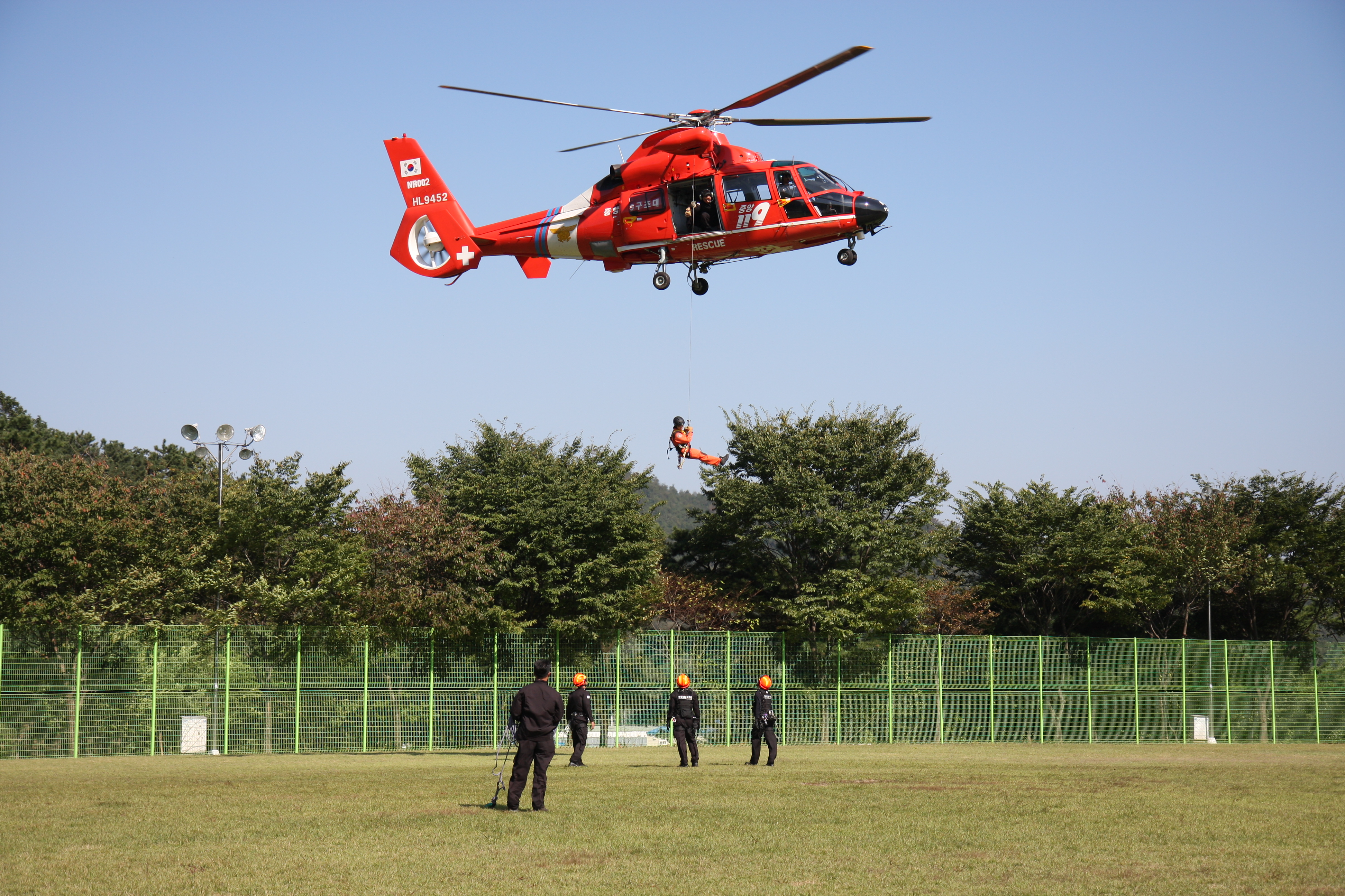 제15기 소방간부후보생